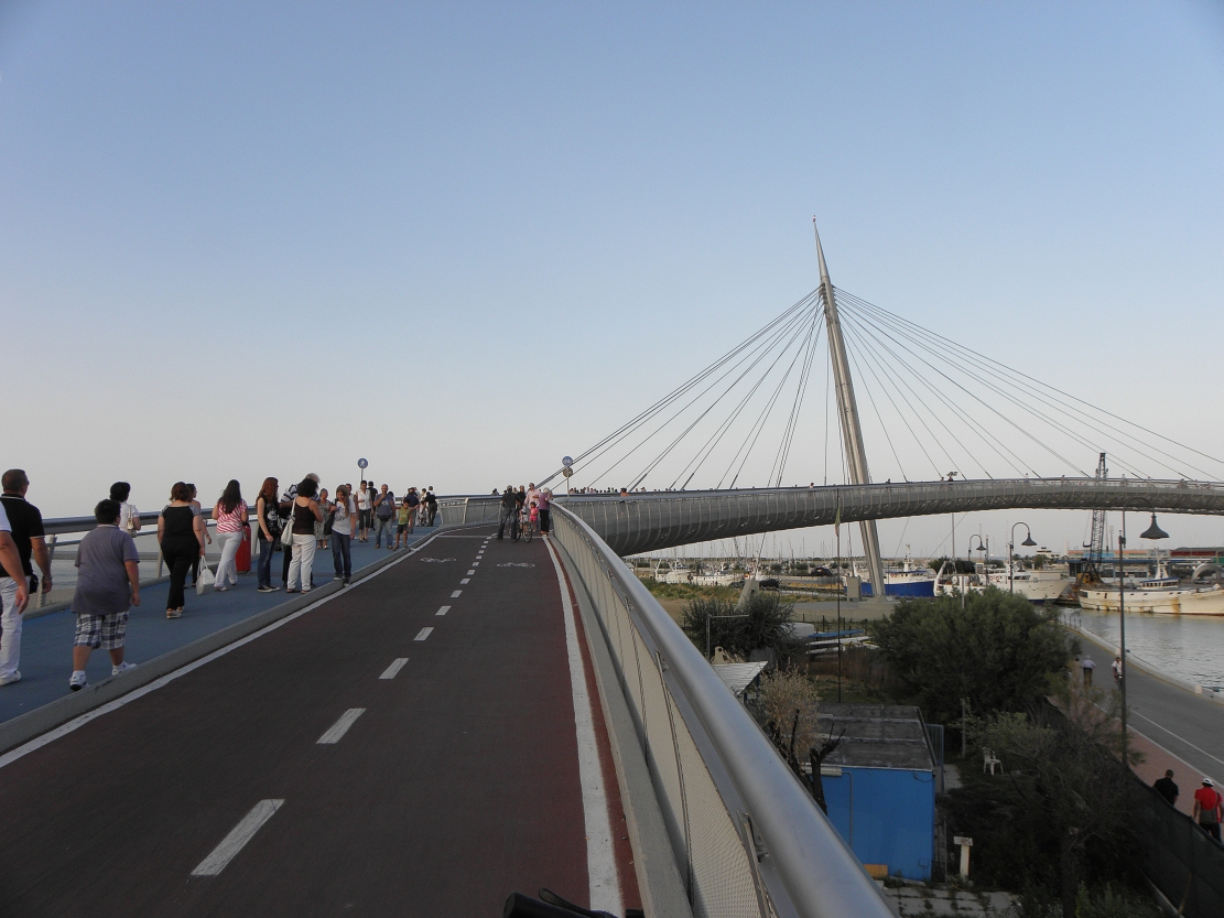 Pescara